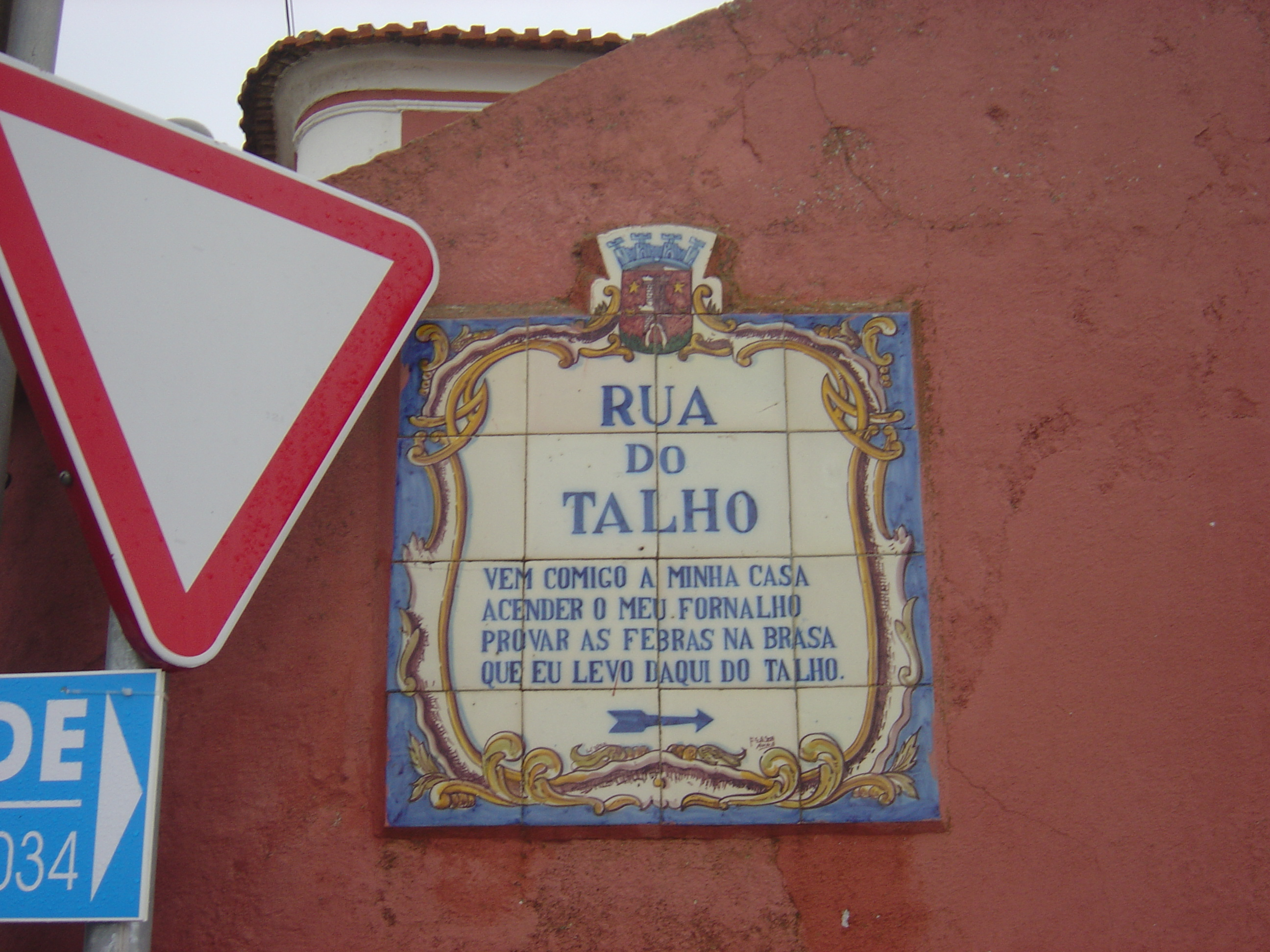 Gouveia (Sintra), Portugal